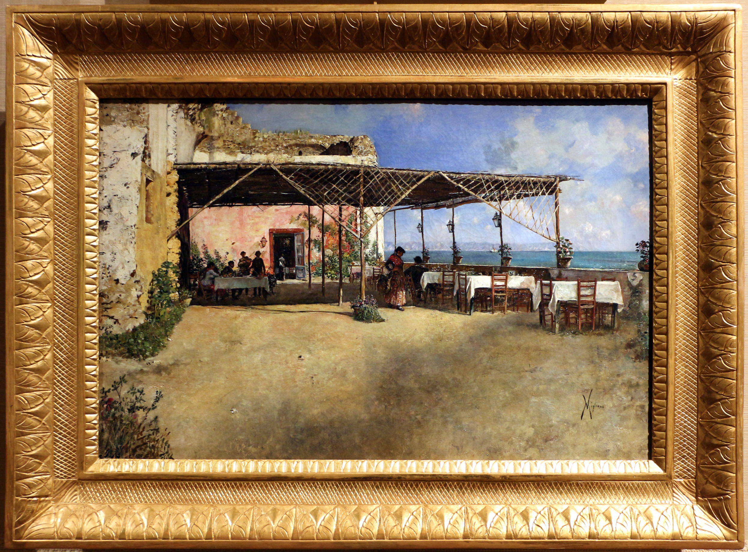 taverna a Posillipotitle QS:P1476,it:"taverna a Posillipo" label QS:Lit,"taverna a Posillipo"